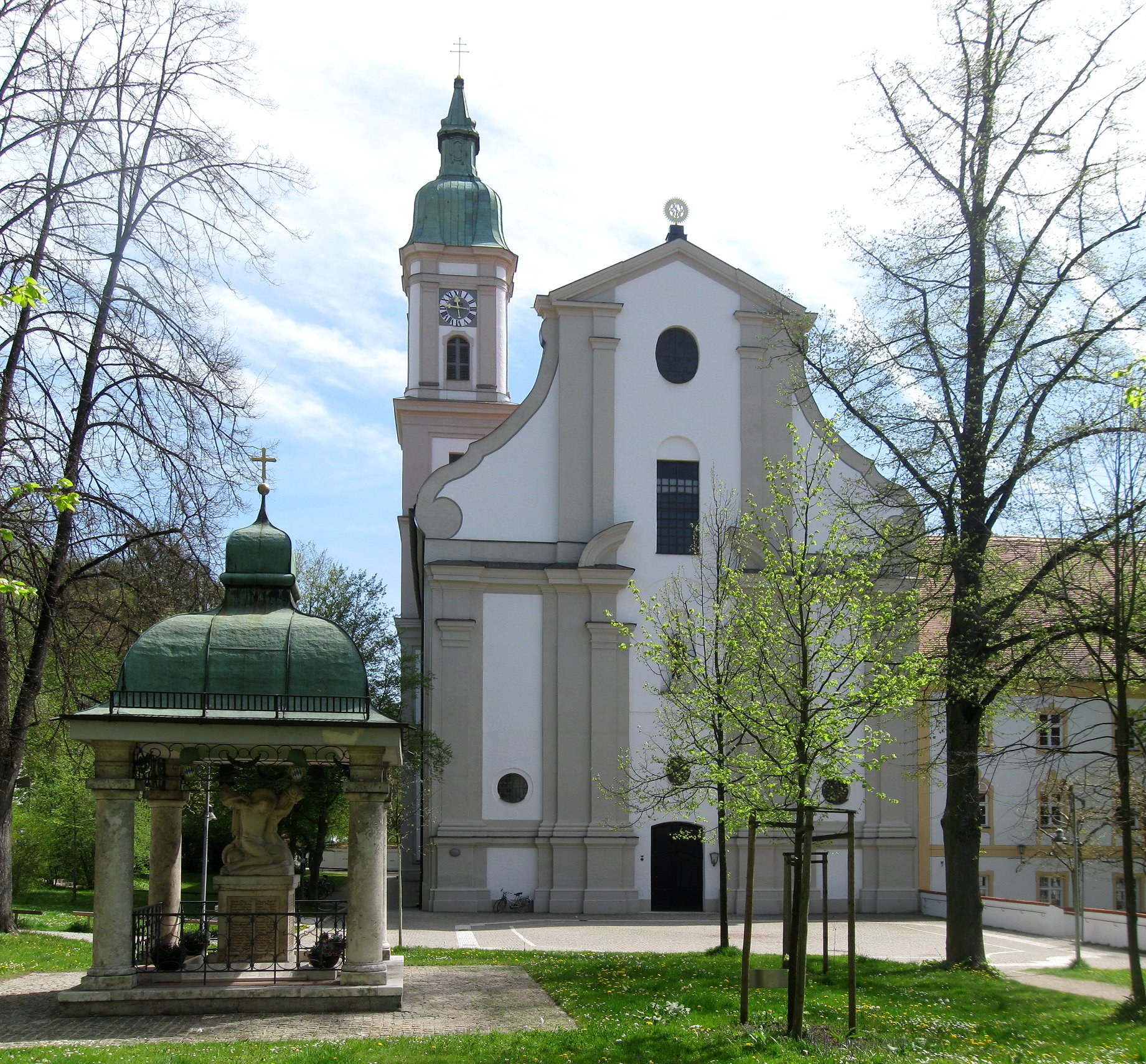 Alte Poststraße 42; Kath. Pfarrkirche St. Peter und Paul Kriegerdenkmal, offener Pavillon mit Haubendach und mittig darin stehender Vollplastik, um 1925. D-1-78-124-2